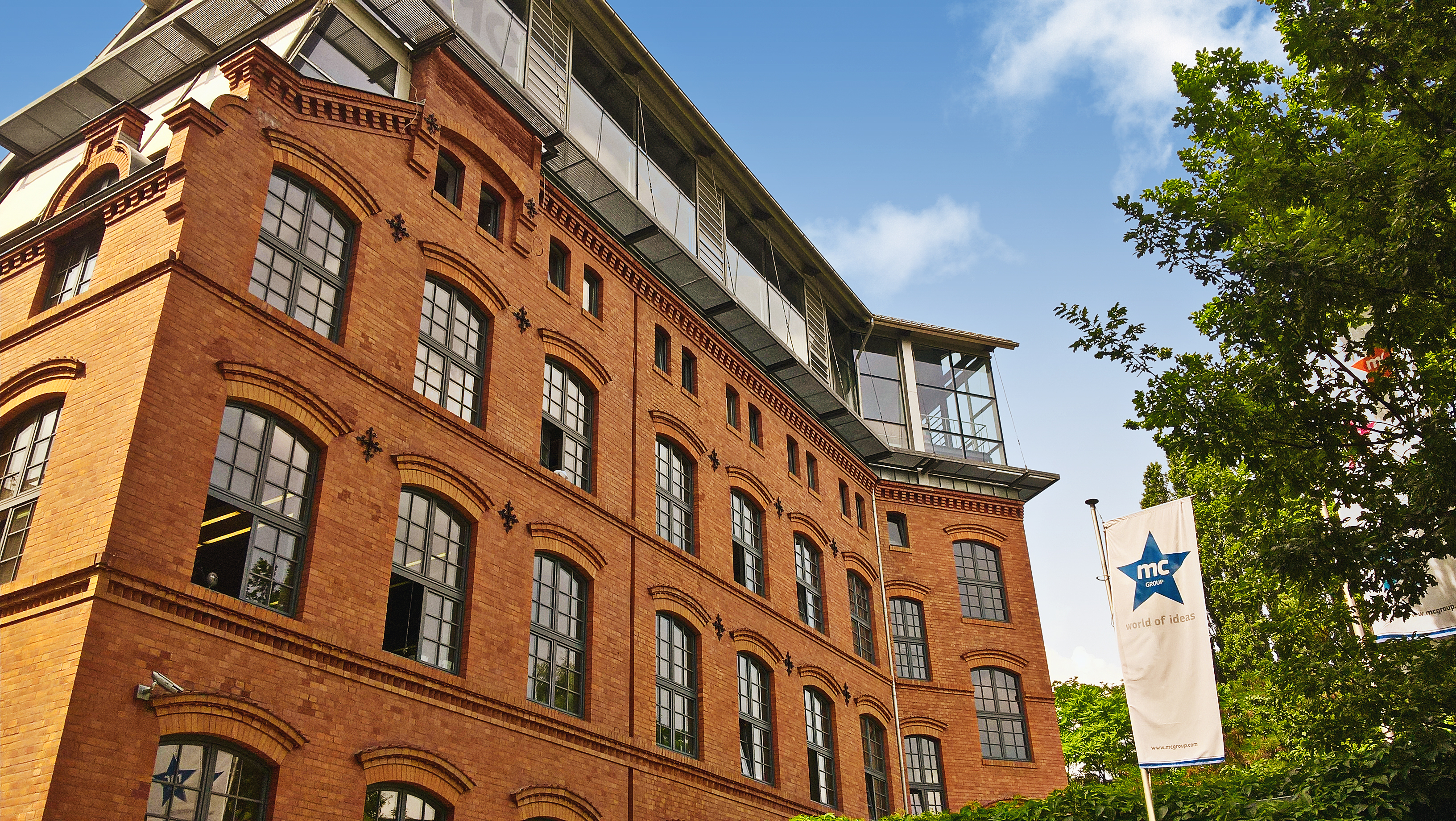 Hauptsitz der mc Group in der Wassergasse in Berlin-Mitte